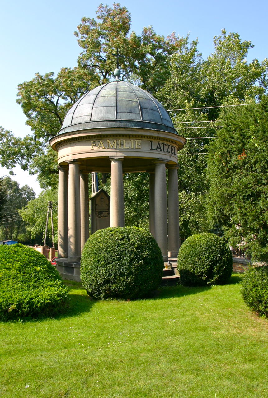 Twardawa – wies w Polsce położony w województwie opolskim, w powiecie prudnickim, w gminie Głogówek.